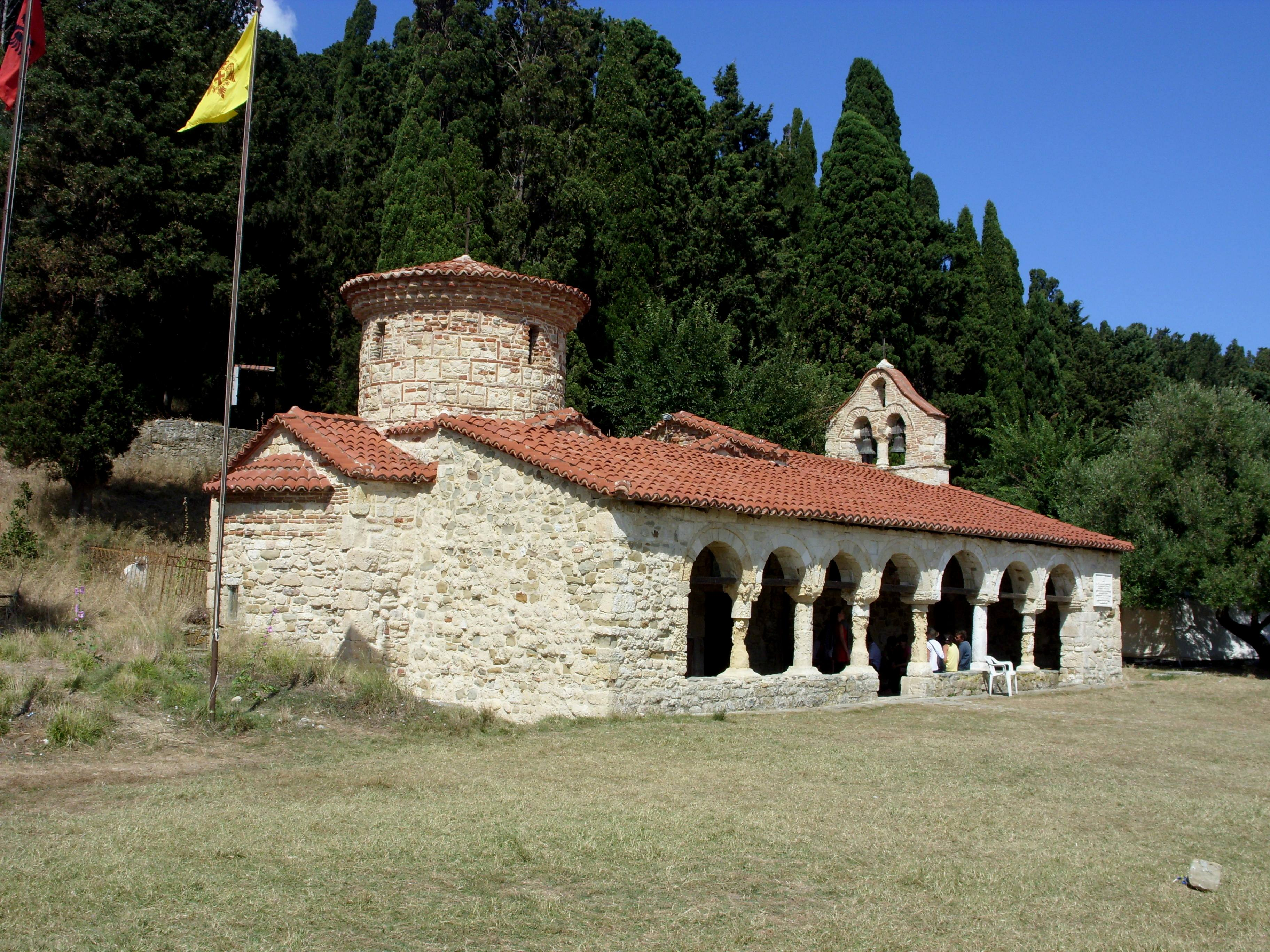 Kloster Zvernec an der Lagune von Narta nördlich von Vlora, Klosterkirche erbaut im 13./14. Jhdt.